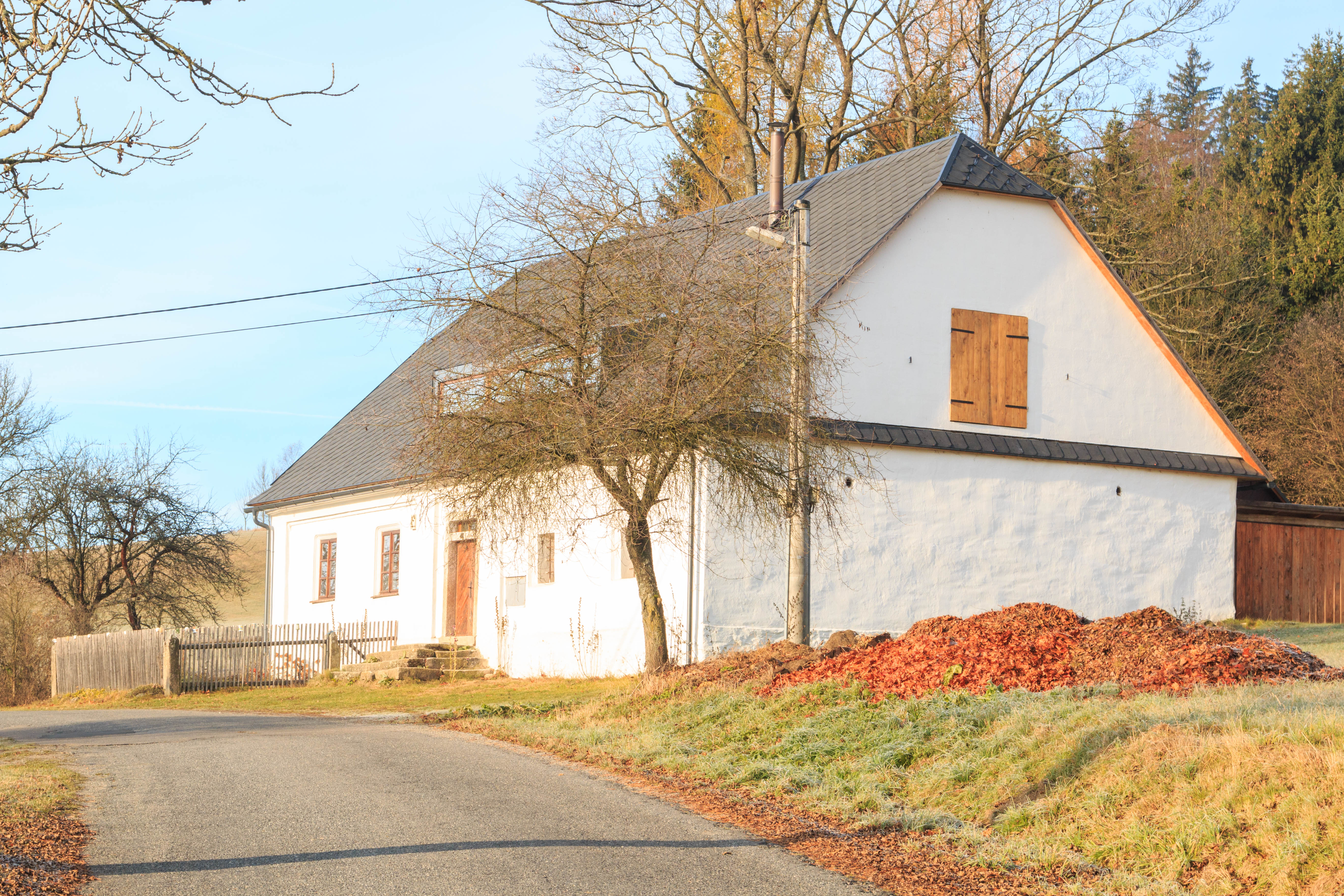 České Milovy